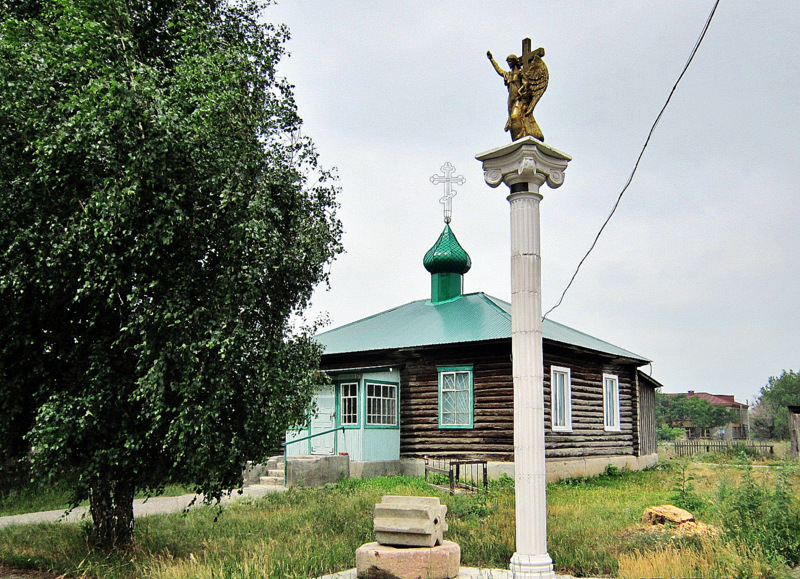 Православная церковь в селе Орлово Немецкого района Алтайского края